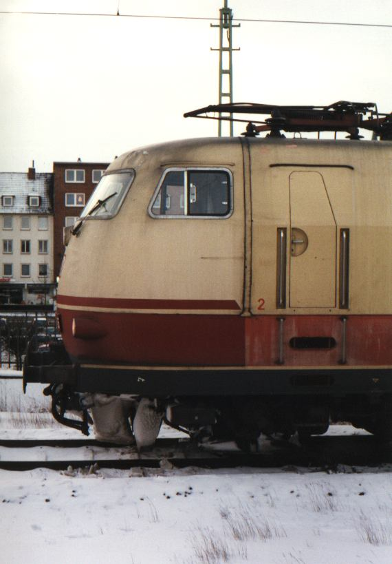 DB engine 103 133 at Bremerhaven Hbf station